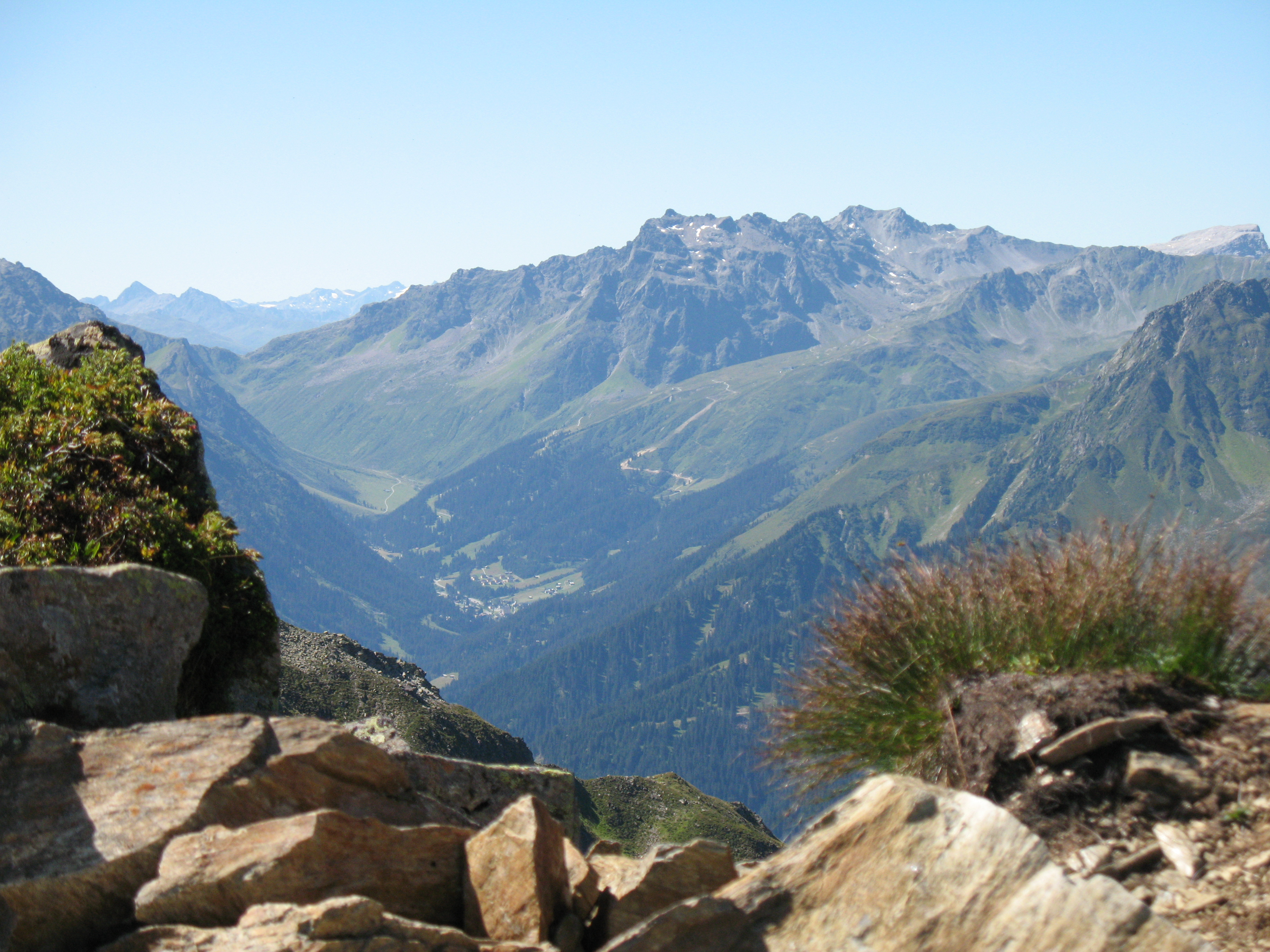 Schruns Hoch Joch Sennigrat blik richting St. Gallenkirch